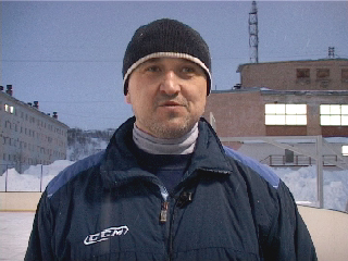 Российский хоккеист Юрий Владимирович Кузнецов на тренировке команд "Медведи" (Заозерск), "Тайфун" (сборная Гаджиево, Видяево), Спутник (Спутник) в ЗАТО г. Заозерск, 2017 год.